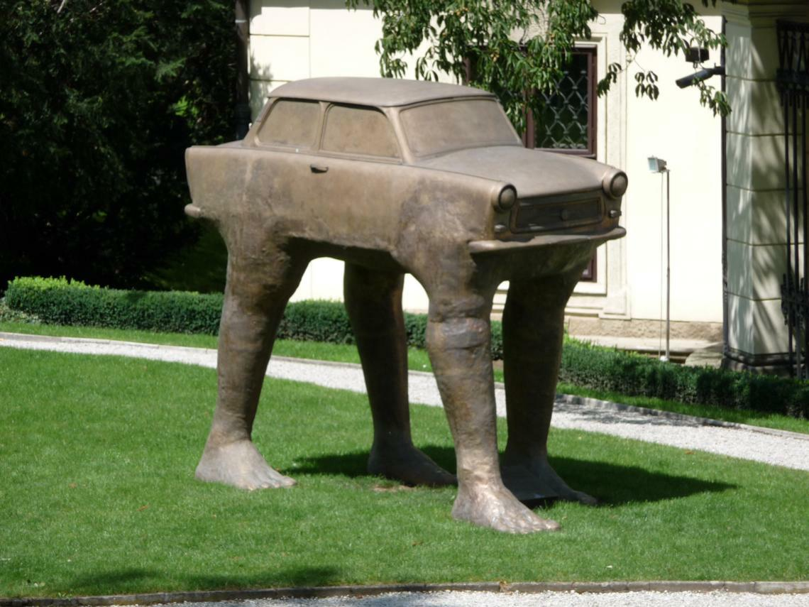 Deutsche Botschaft in Prag, Ausreisedenkmal